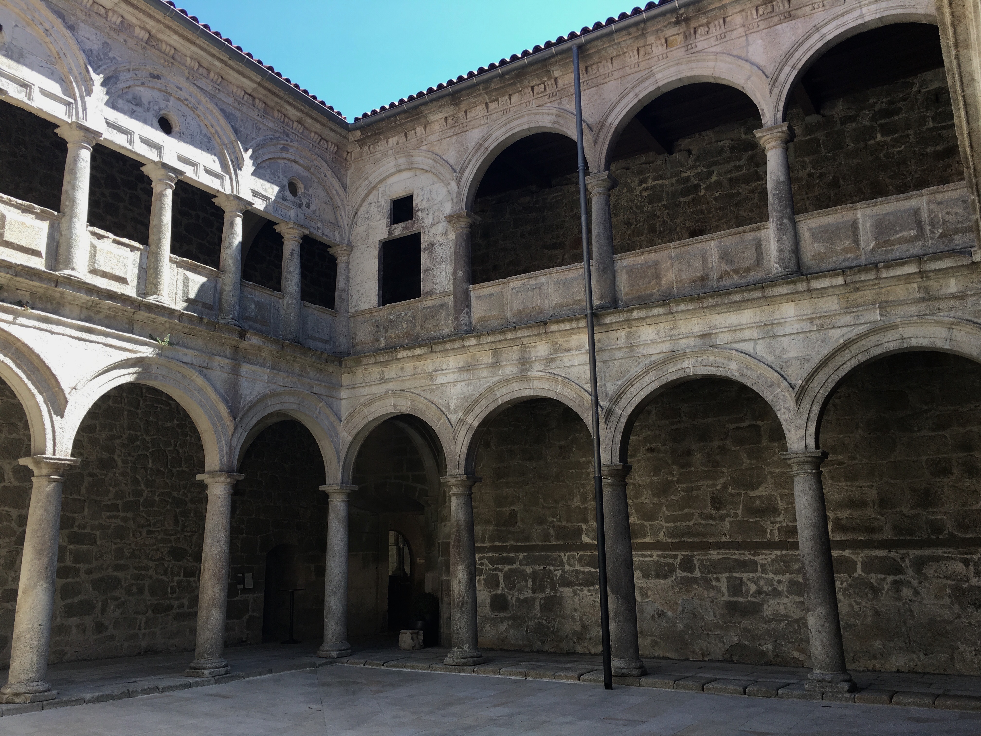 Santo Estevo de Ribas de Sil. Claustro do Viveiro.